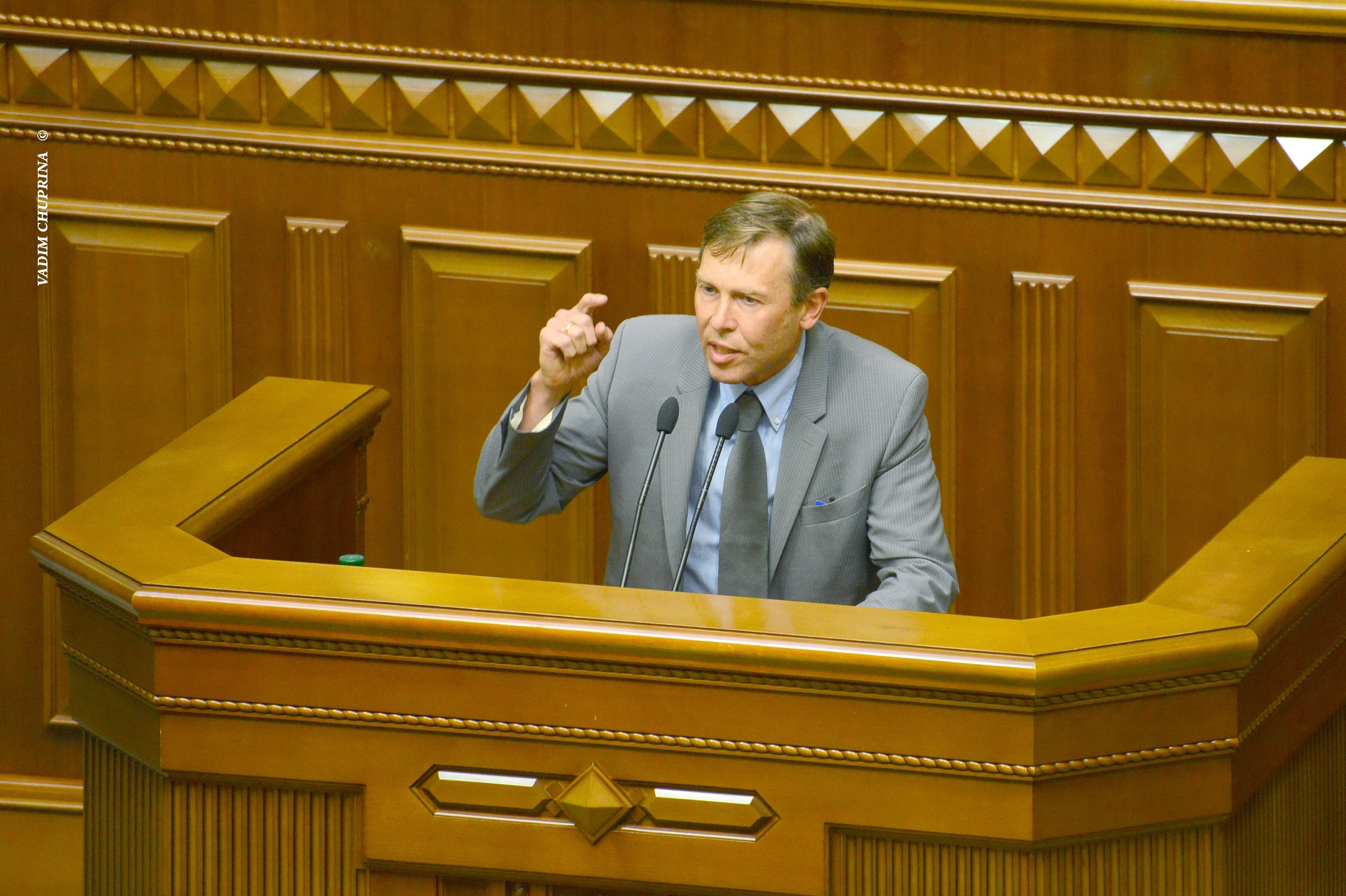 ВЕРХОВНА РАДА УКРАЇНИ 2013 , фото Вадим Чуприна